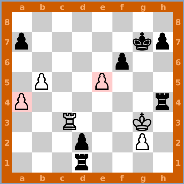 partie de gnuchess (blanc) contre crafty (noir) dans l'interface glChess